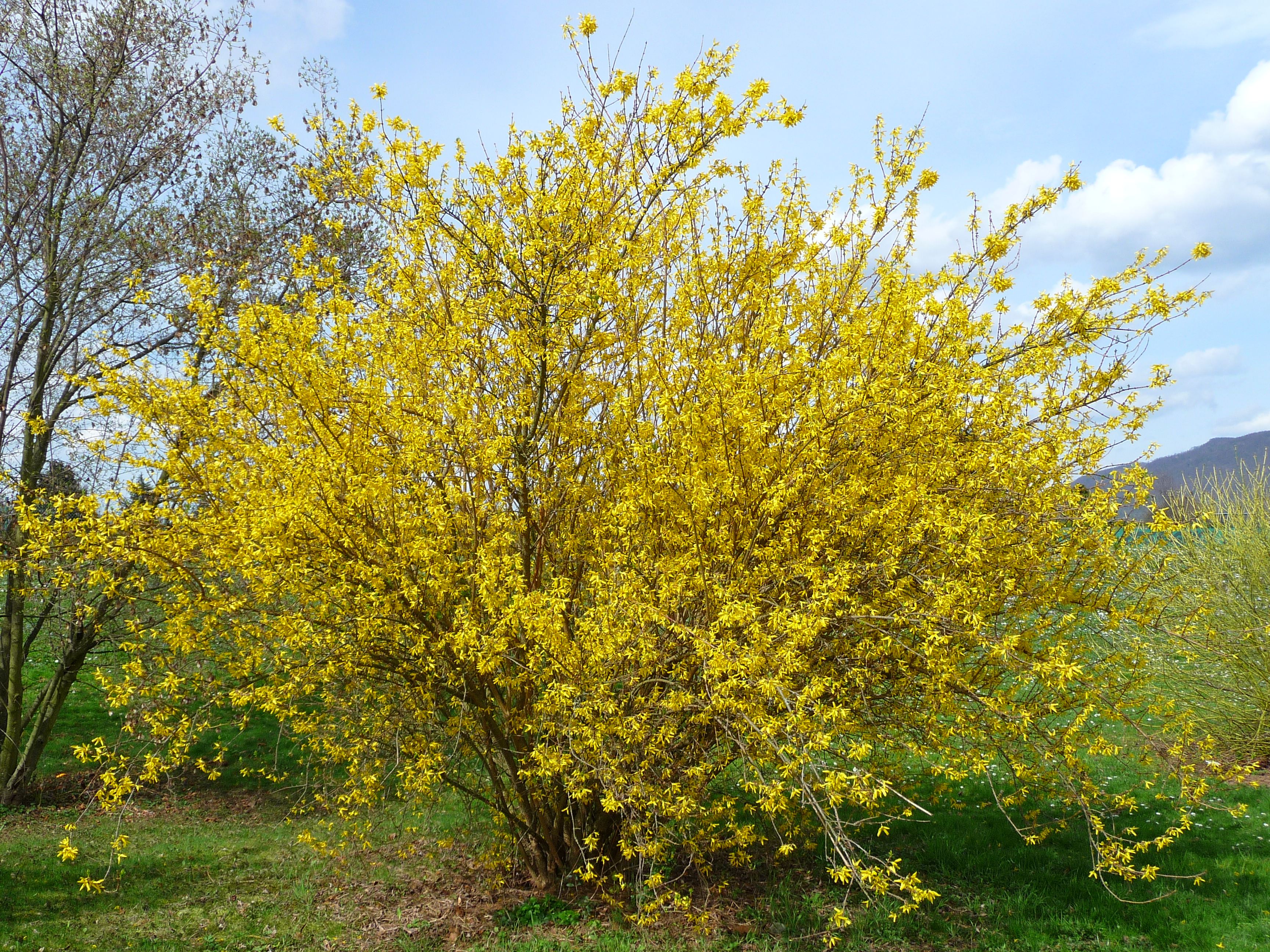 Goldglöckchen oder Forsythie (Forsythia × intermedia), fotografiert in Heidelberg (Baden-Württemberg, Deutschland)